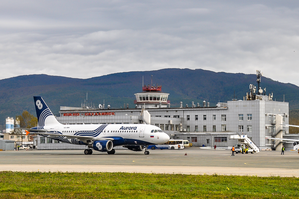 Фото Михаила Родина